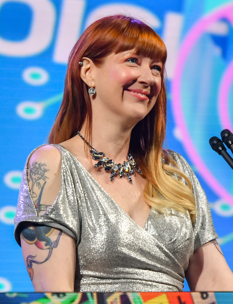 D5X_8381